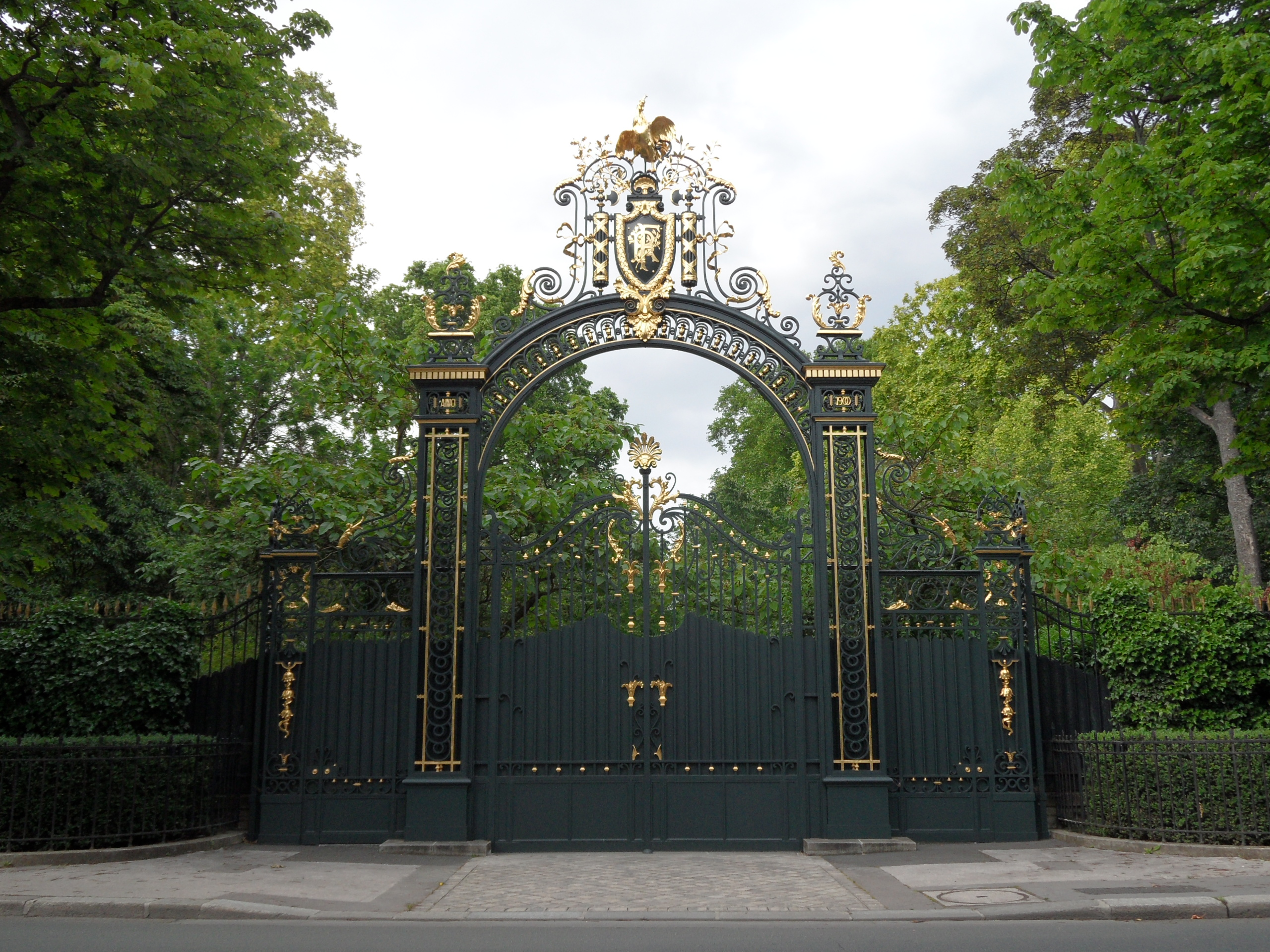 Eliseo